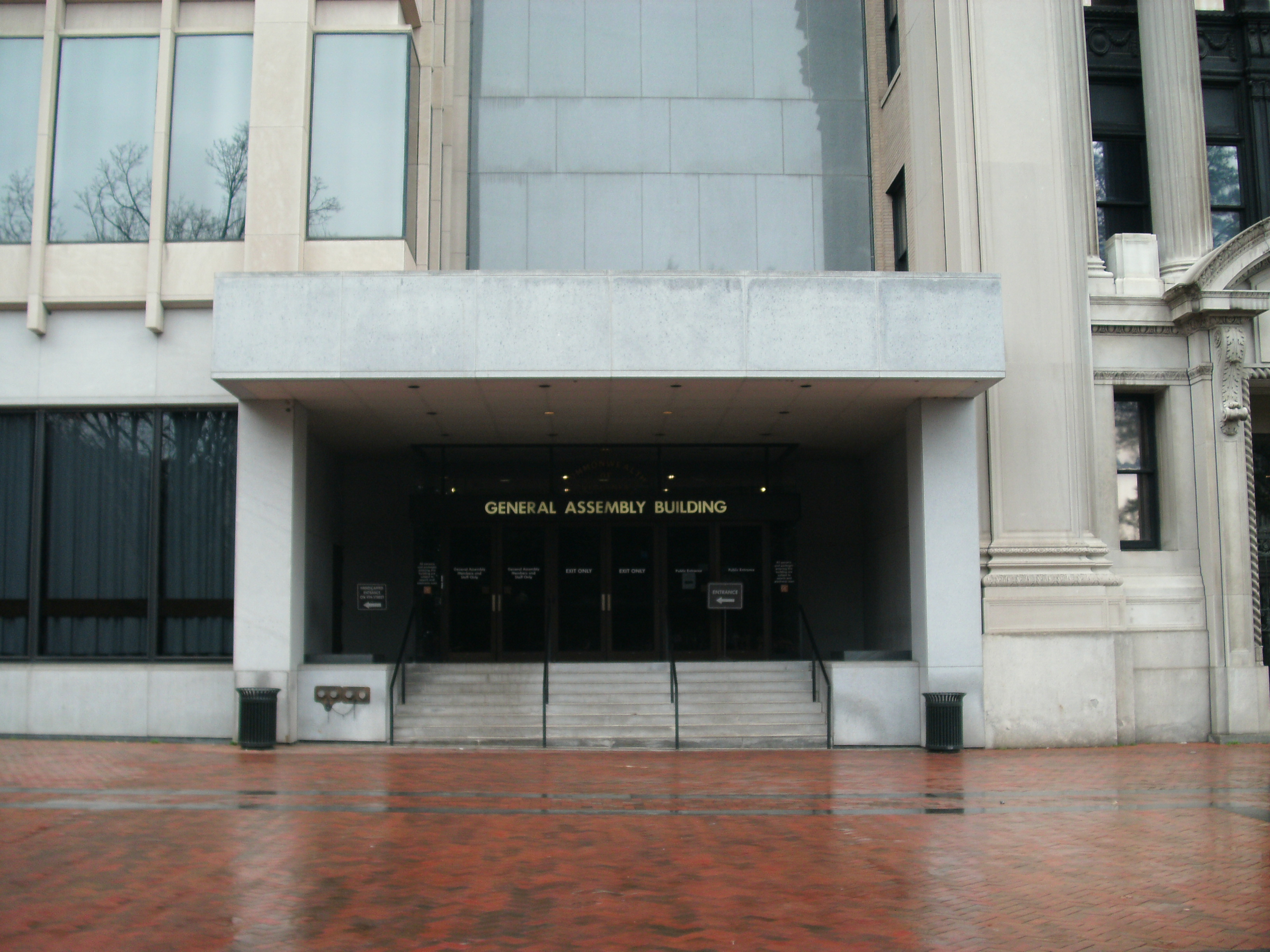 Virginia State Capitol, Richmond, VA GEDSC DIGITAL CAMERA